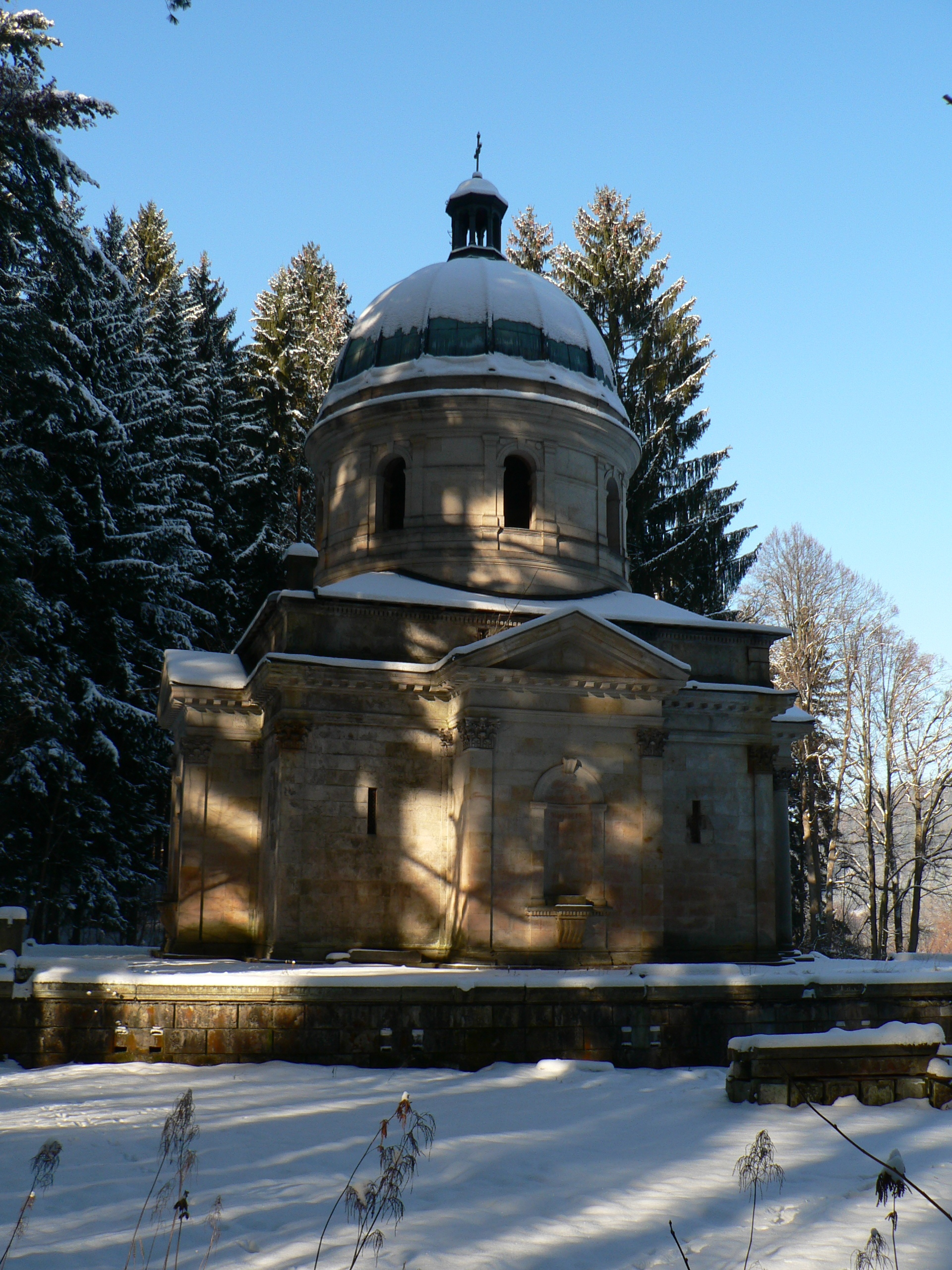 Hrobka rodiny Kleinů (Sobotín)